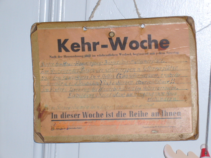 Ein Kehrwochenschild, wer das Schild hat, muss kehren